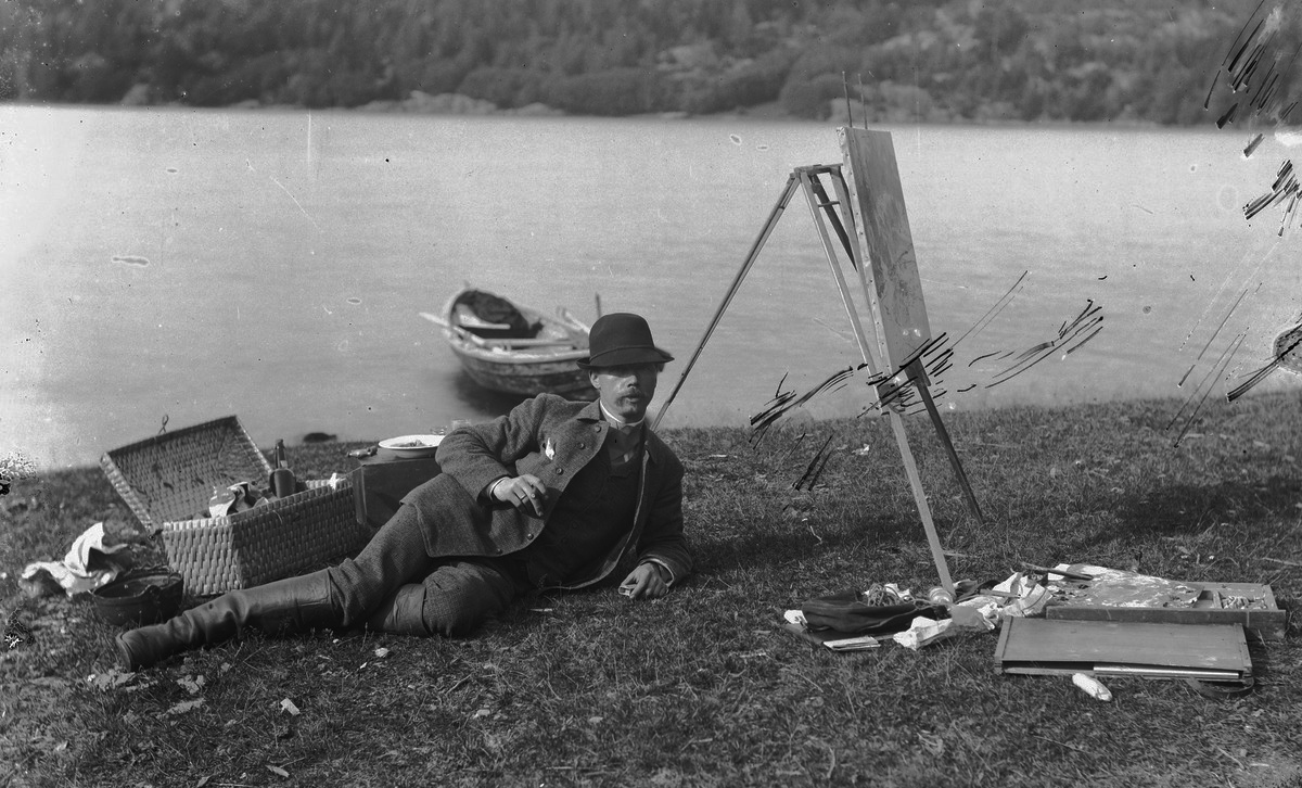 Ludvig Skramstad med stafeli